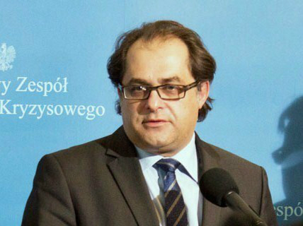 Marek Gróbarczyk, inżynier, menedżer i polityk.